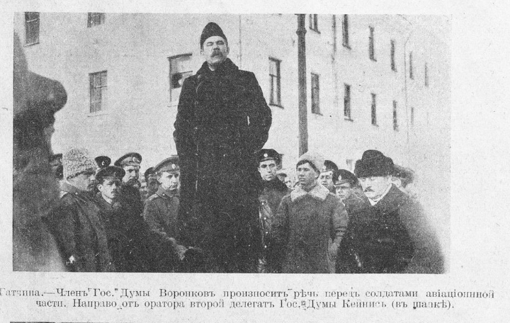 Воронков М.С. март 1917 года